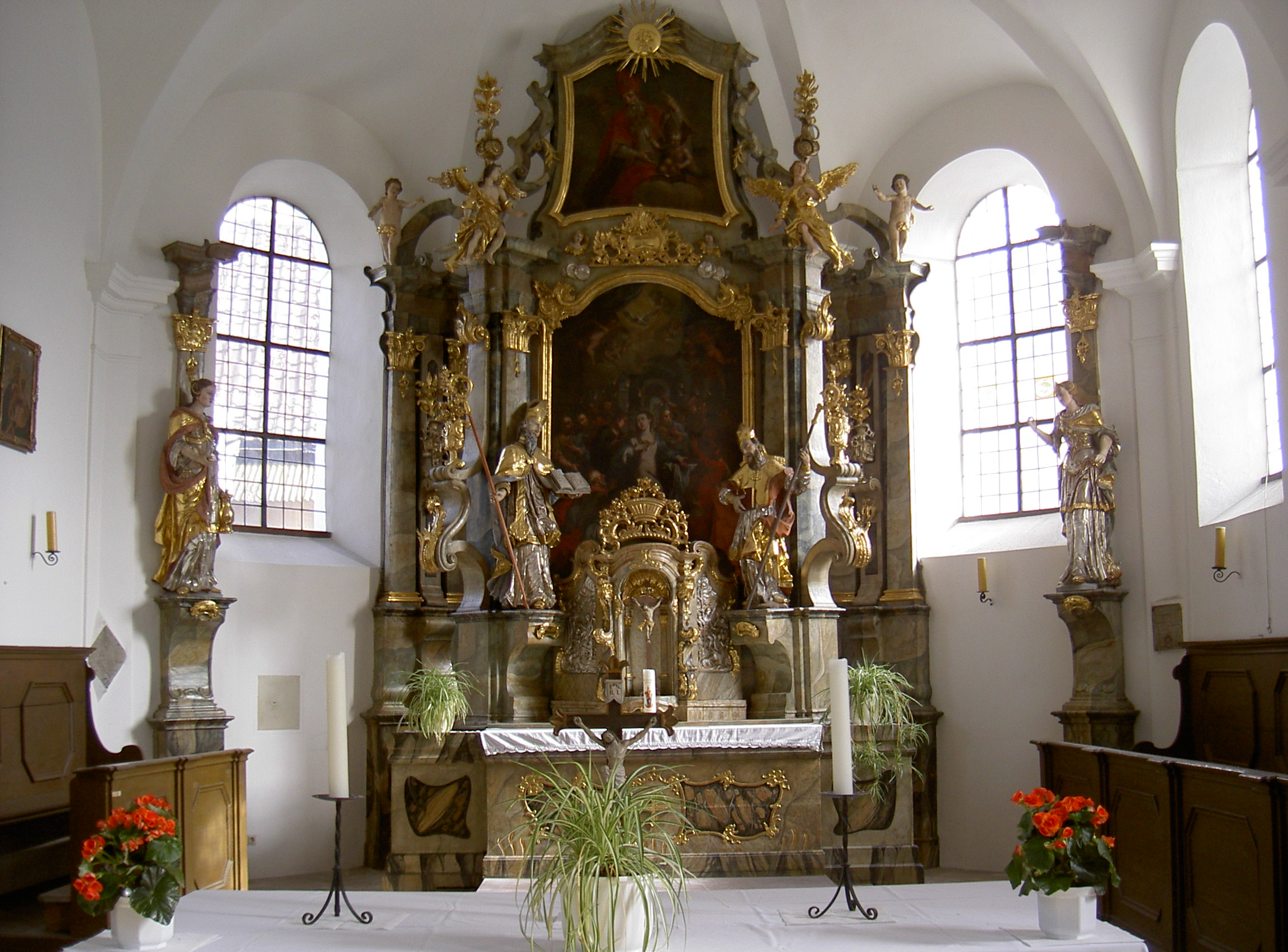 Spitalkirche Hl. Geist in Cham (Oberpfalz)